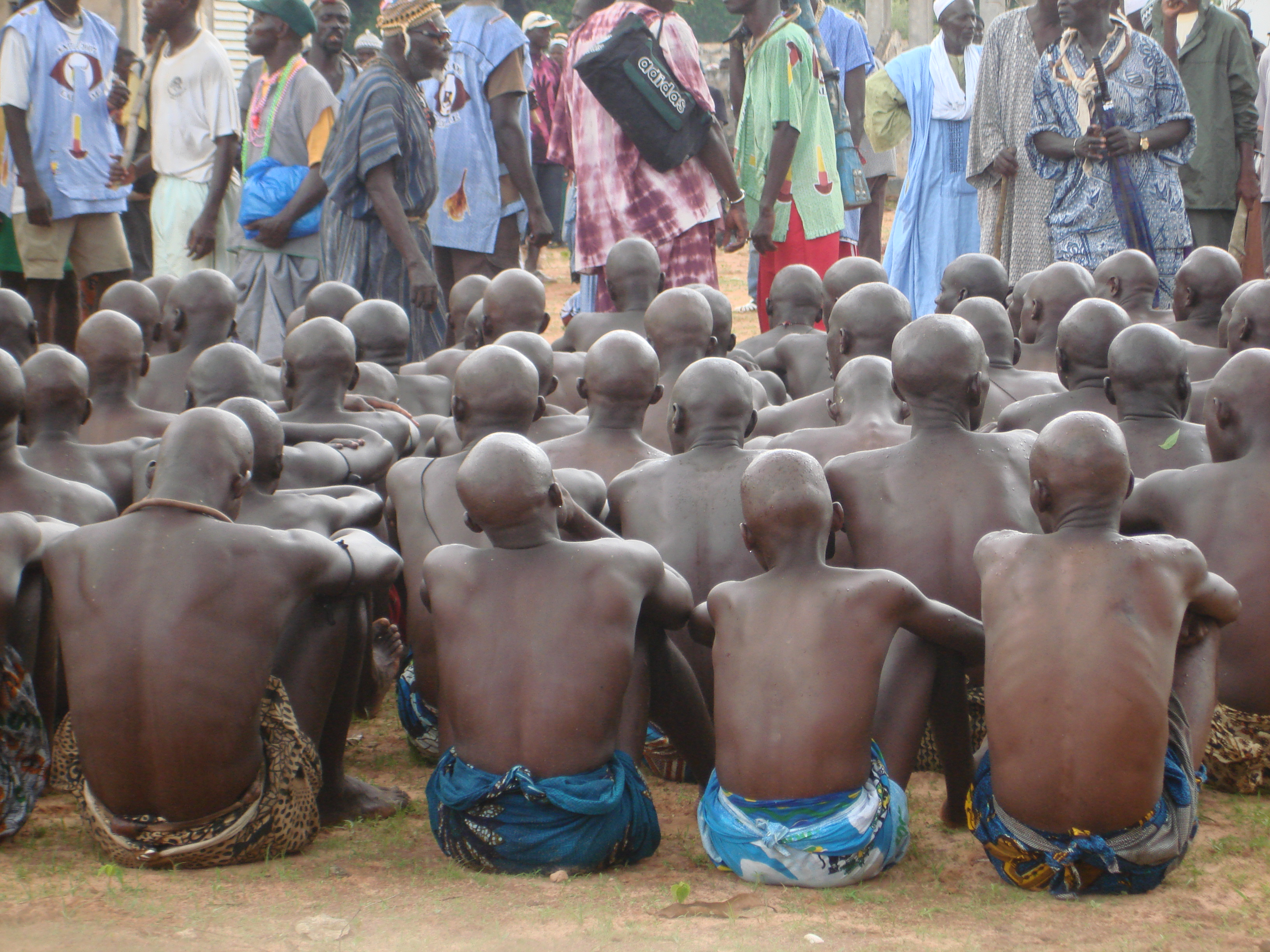 Les futurs initiés après le rasage, lors du boukout (rite d'initiation diola) de Baïla (Casamance, Sénégal)